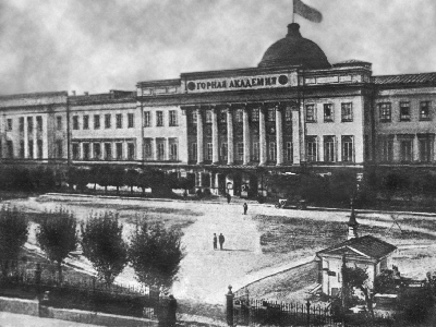 Первый корпус Московской горной академии